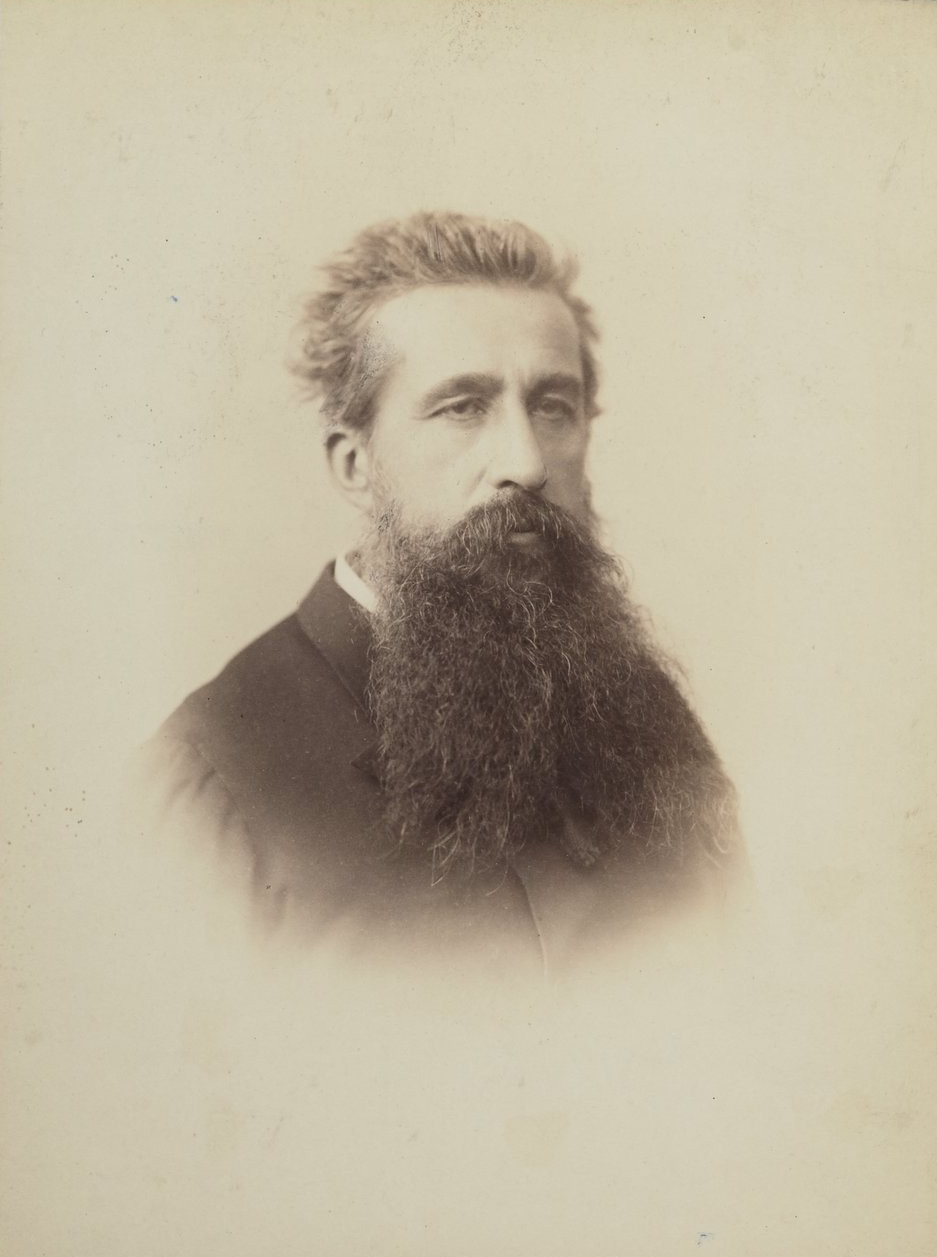 Portrait de l'explorateur et promoteur colonial Paul Soleillet, par le photographe à la mode Mathieu-Deroche, médaille d'or aux expositions de Paris de 1878 et 1889. Photographie probablement prise en 1886, année de la mort accidentelle de Soleillet à Aden.